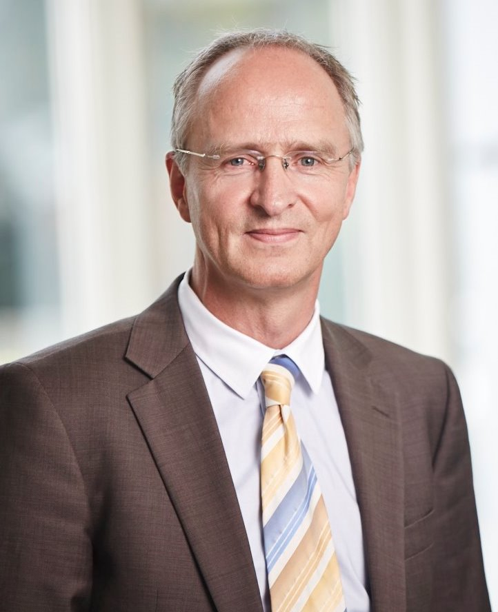 Kurt_Bellmann__Geschäftsführer_StudioHamburg.jpg